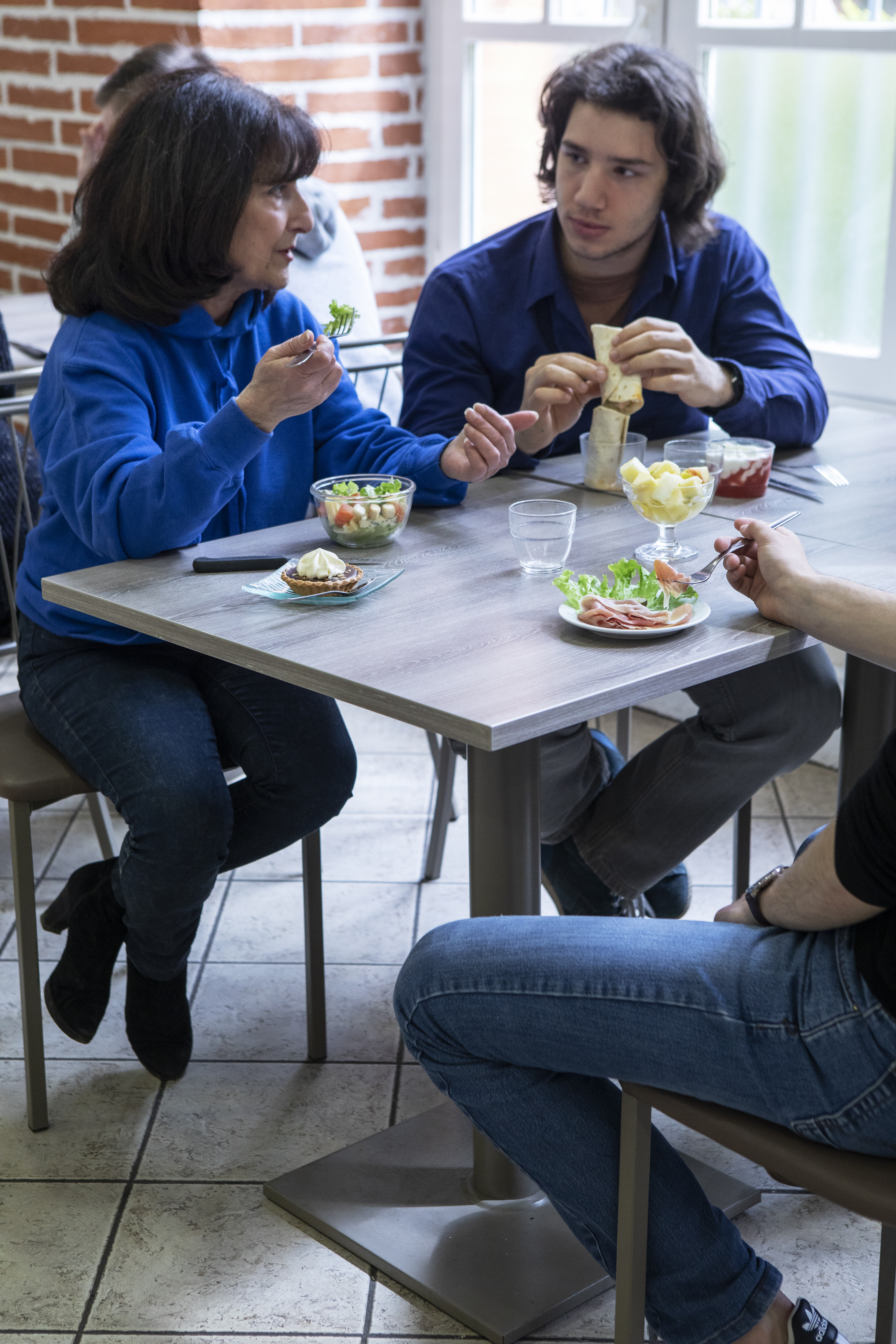 Self ICT